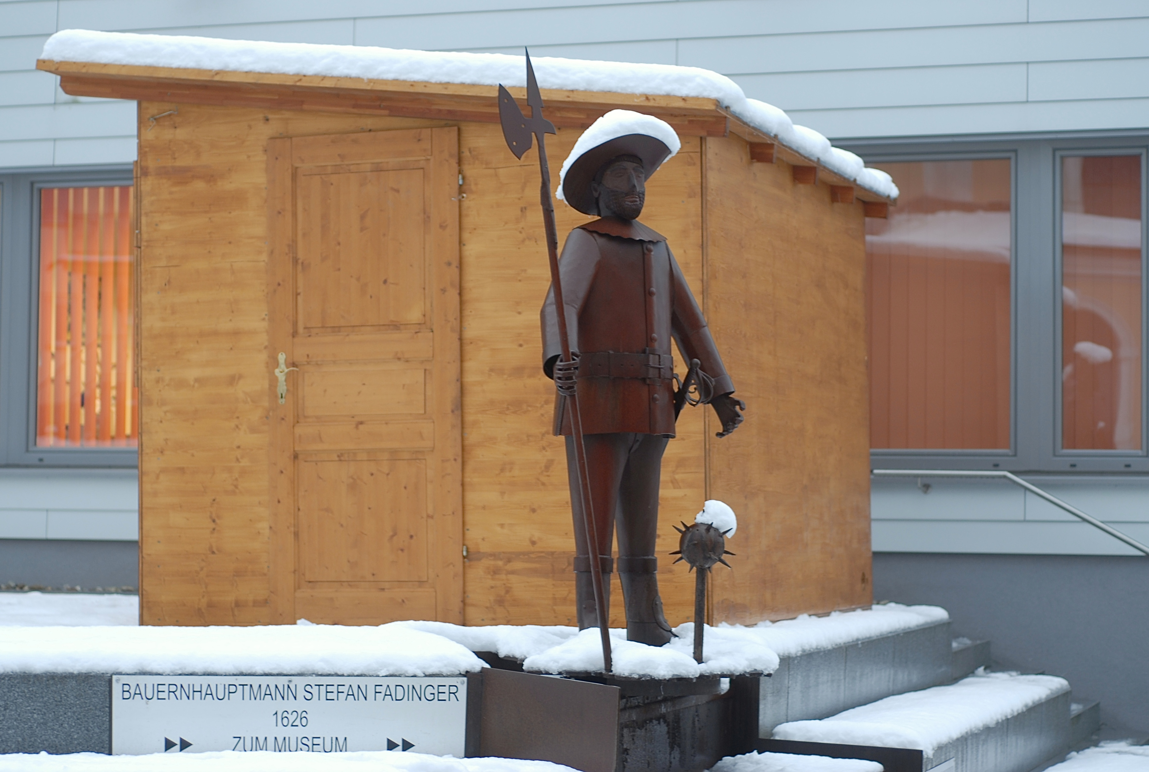 Atefan-Fadinger-Denkmal vor dem Gemeindezentrum St. Agatha